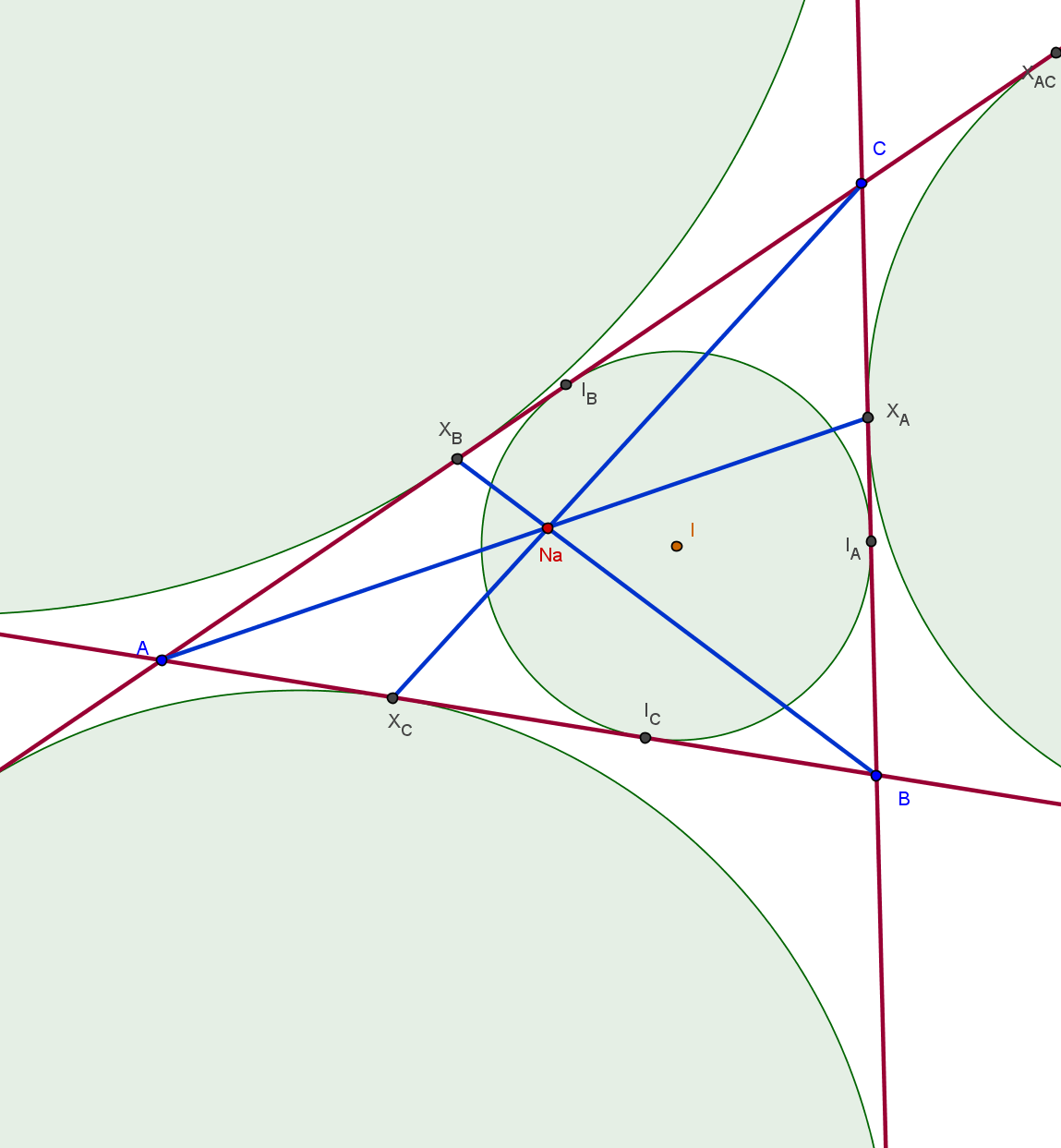 Nagelin piste